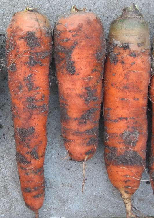 Winterwortelen.